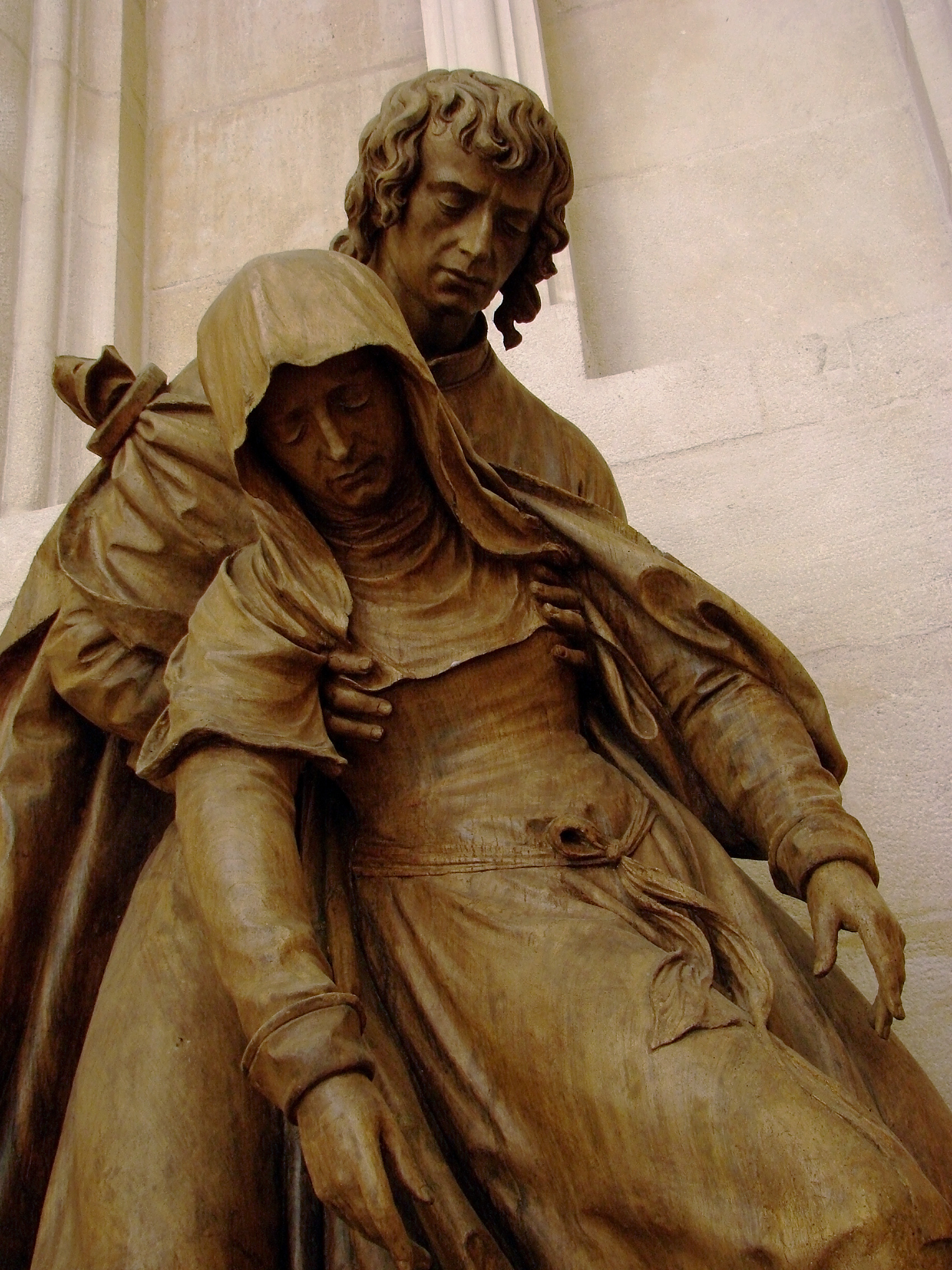 Pâmoison de la Vierge par Ligier Richier (1500-1567). Groupe en noyer, 1531. Église abbatiale Saint-Michel de Saint-Mihiel.